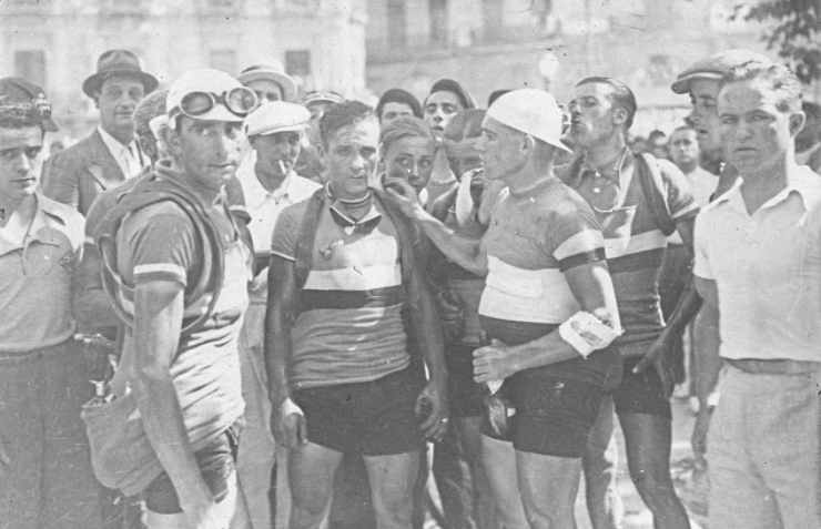 Tour de France 1936, 13e étape (contre la montre) Nîmes-Montpellier le 22 juillet : arrivée à Montpellier, de g. à dr., Antonin Magne, Paul Maye, Maurice Archambaud (légèrement en retrait) René Le Grèves et derrière lui, buvant à la bouteille, Robert Tanneveau (équipe de France).